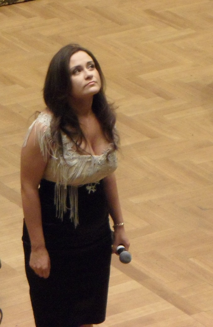 Evelina Sašenko "Aviva" koncerte Kaune, 2011 m.